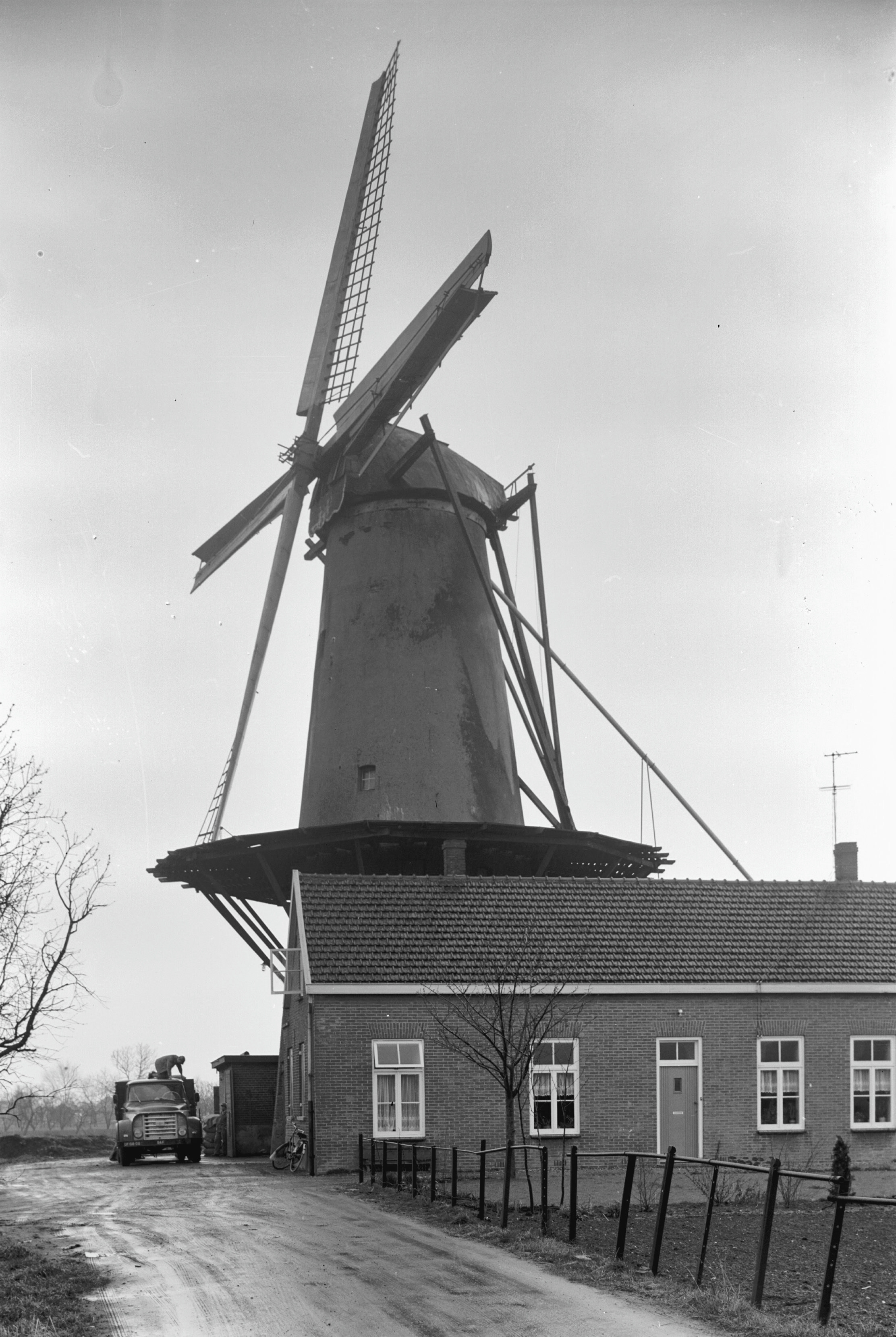 Diversen: molen "de Welvaart"